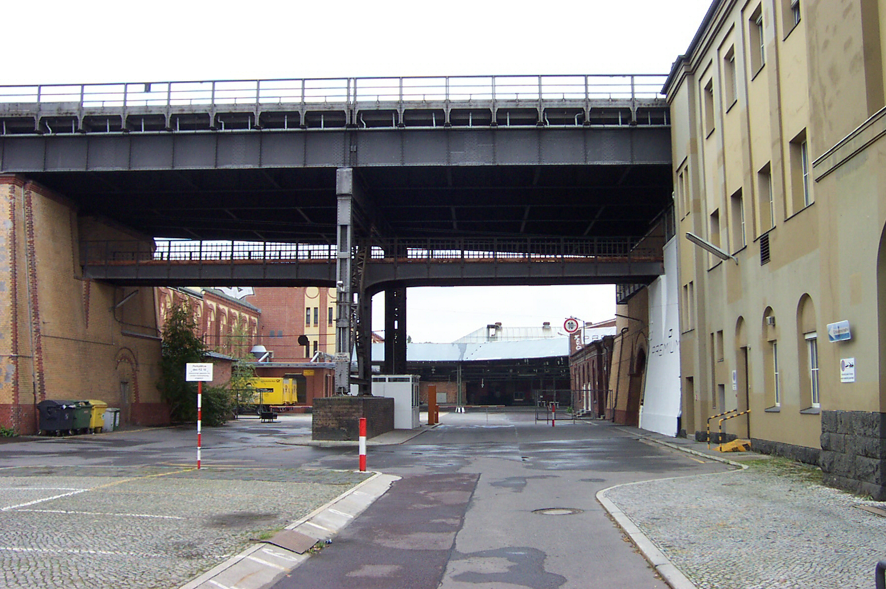 Berlin Dresdener Bahnhof and its Postbahnhof in 2005